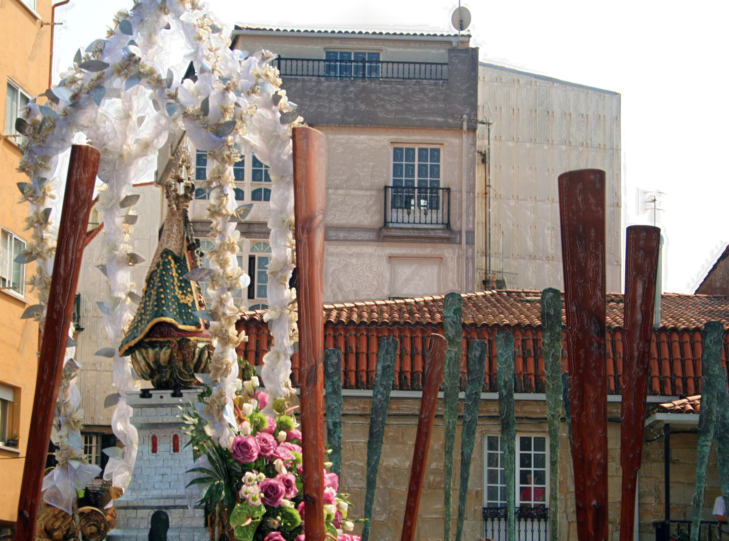 Estiven fedellando un pouco nos filtros para darlle outro aspecto á imaxe, máis que nada por aproveitar as ferramentas que teño no portátil e por ir aprendendo ;)